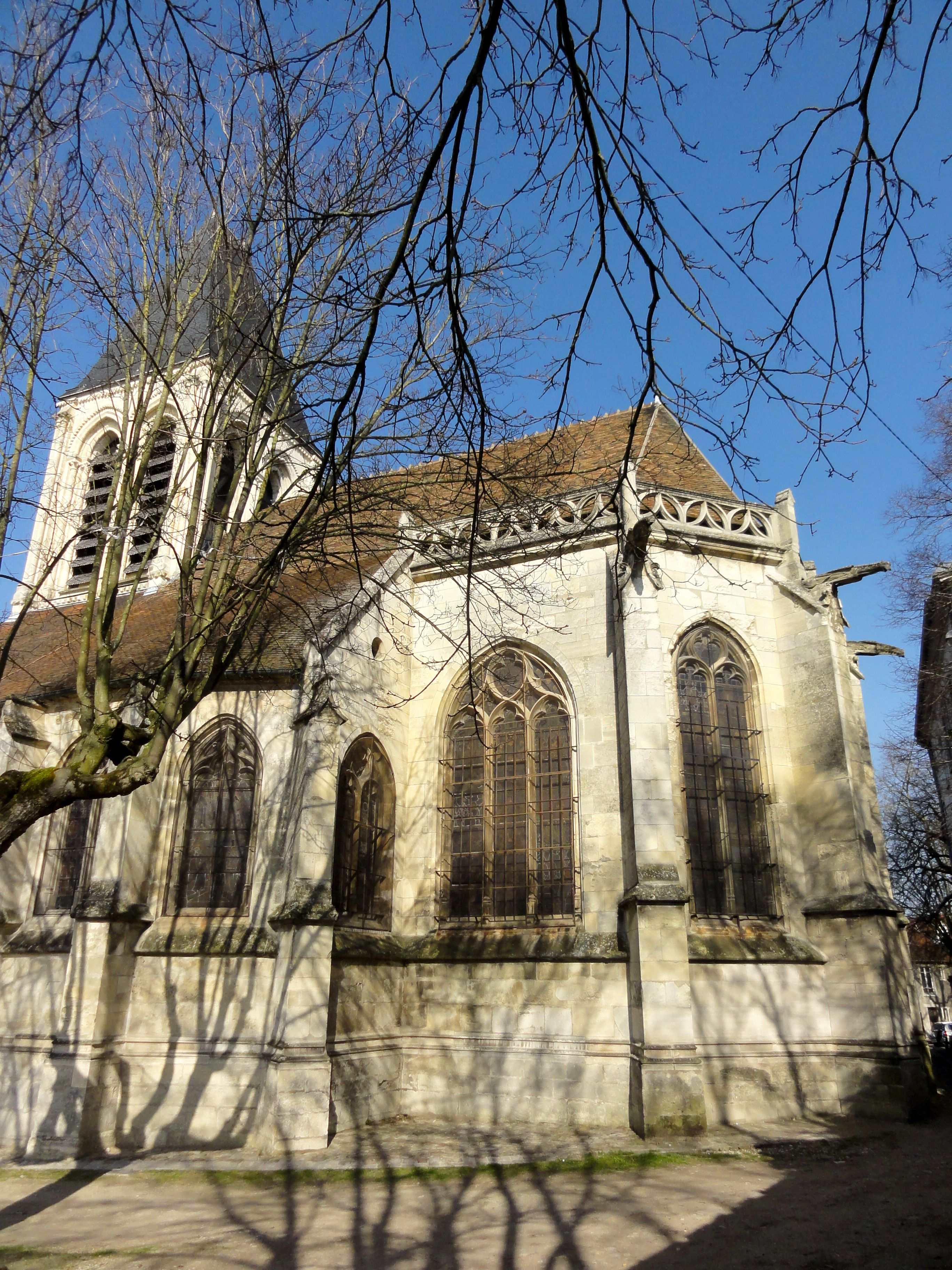 Chœur, côté sud.